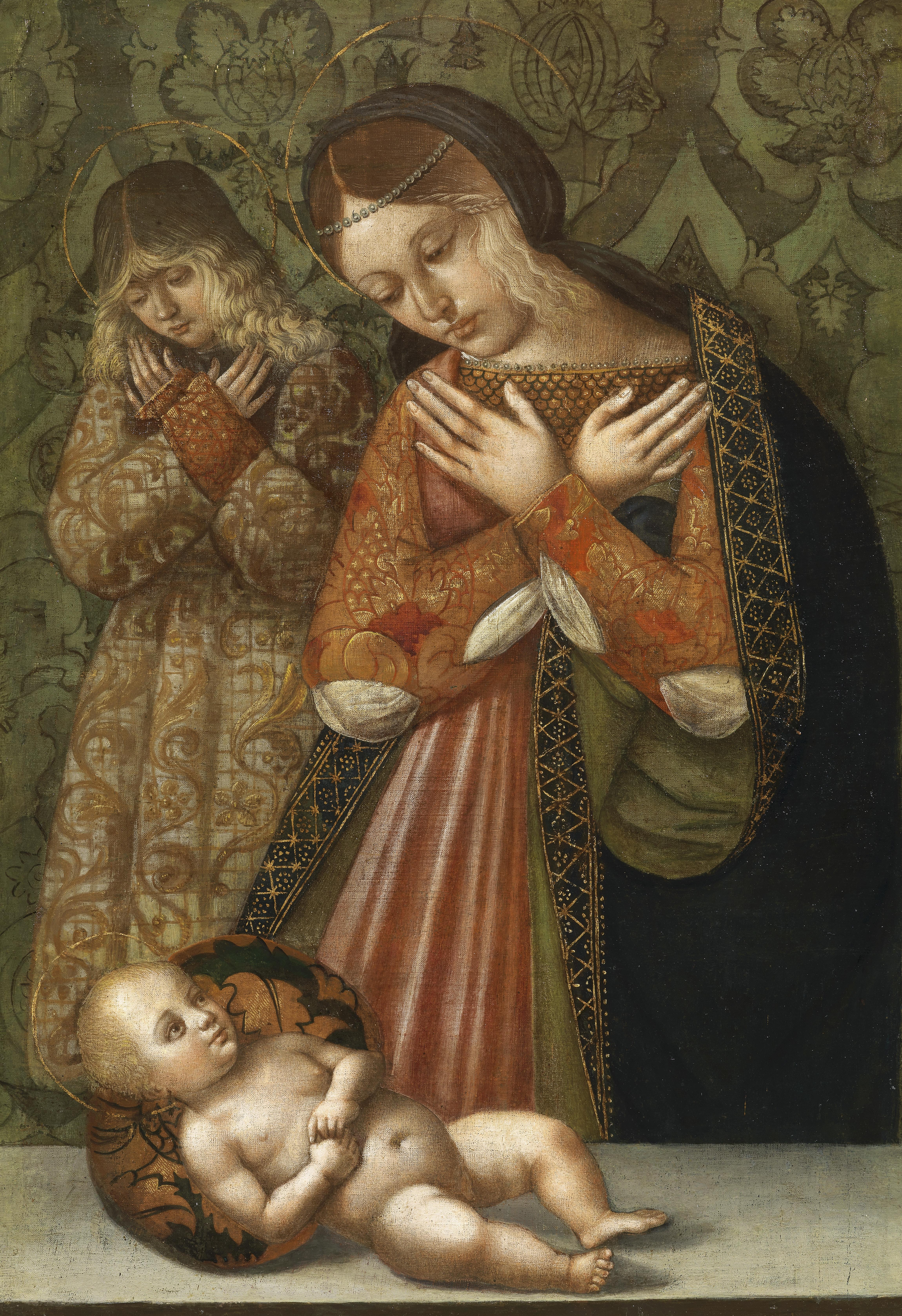 Maria und ein Engel in Anbetung des Kindes